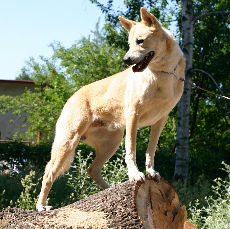 Canaan Dog